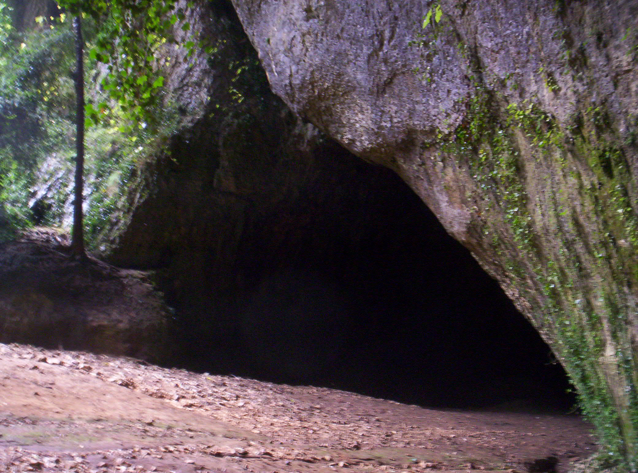 La grotte du gouffre Espelucas - Dions (Gard)